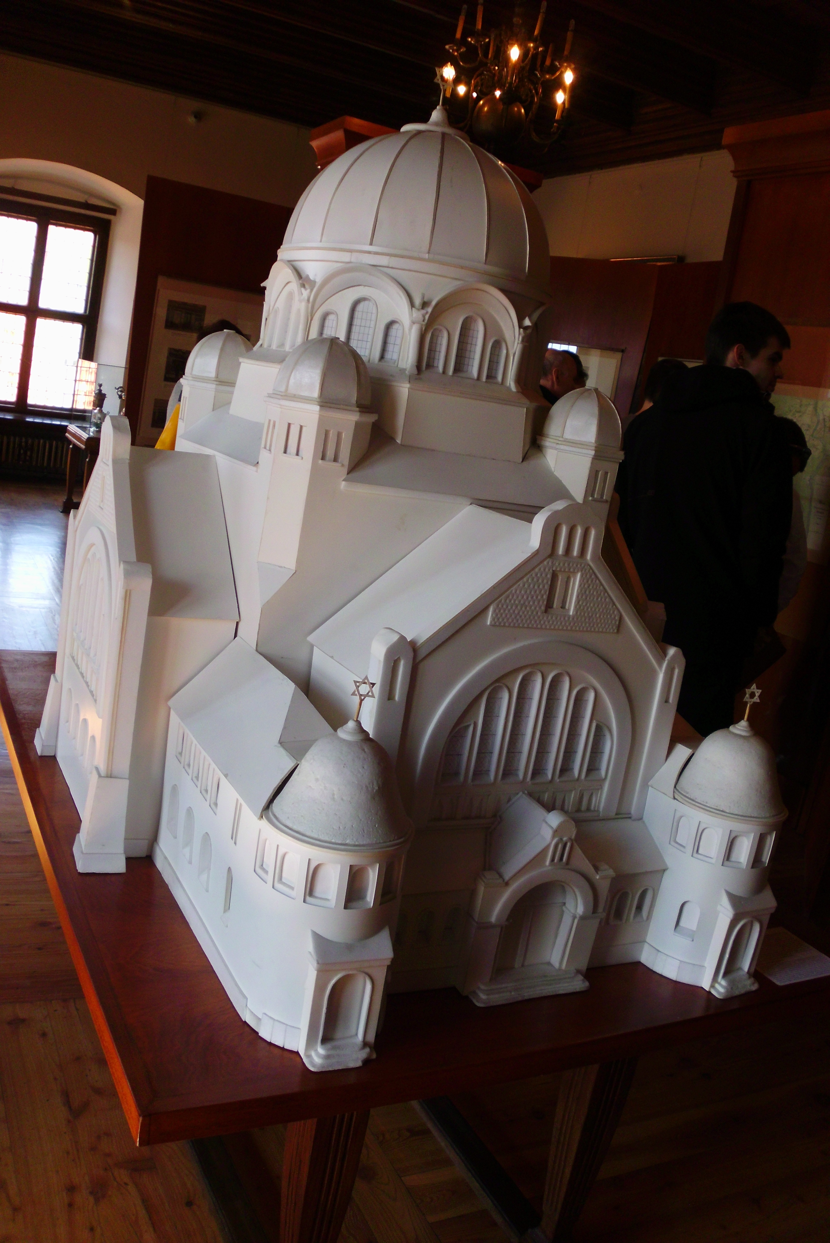 Model Nowej Synagogi w Poznaniu na wystawie w sali Królewskiej poznańskiego ratusza - maj 2015